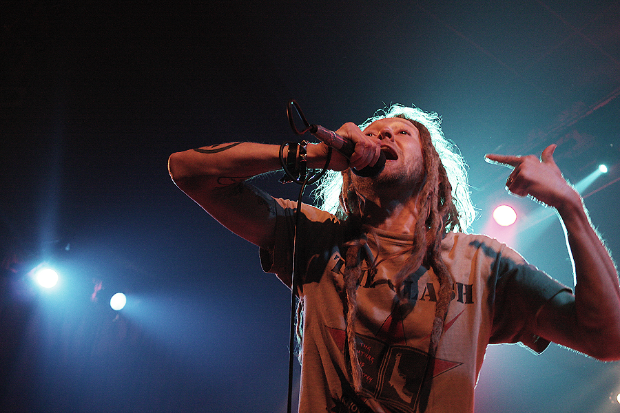 Strike Anywhere en la Sala Apolo, Barcelona, 2010. Fotos: Xavi Pedret. Puedes leer la crónica del concierto aqui!